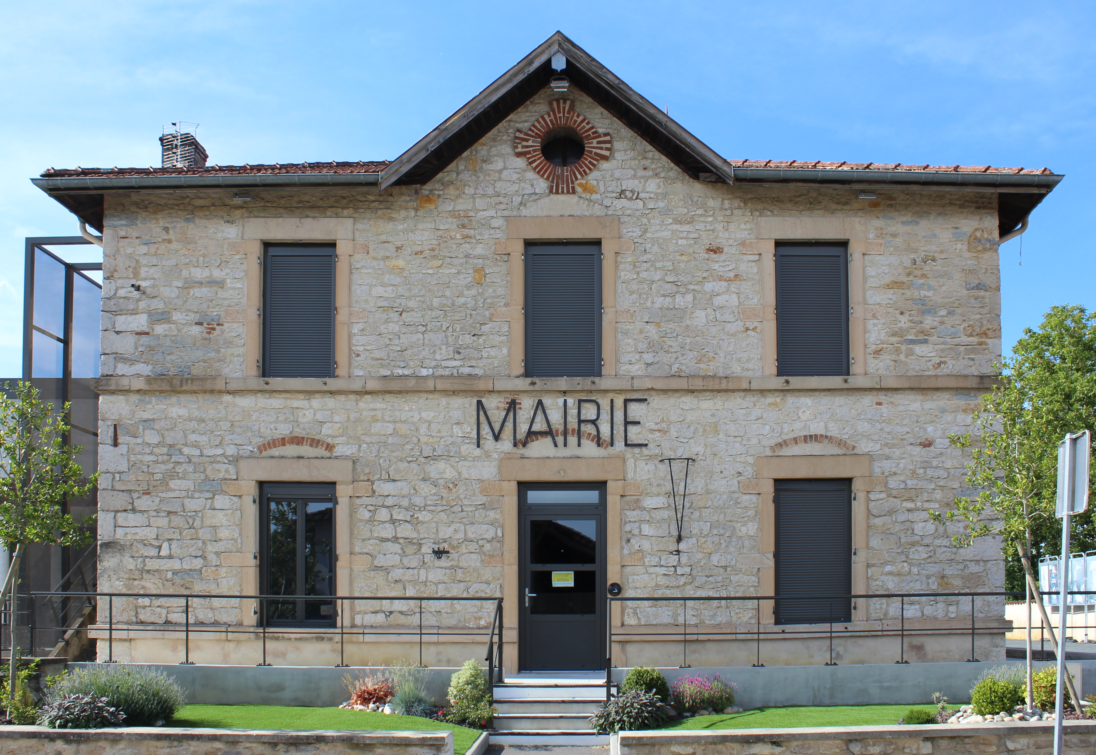 Mairie de Lescheroux.